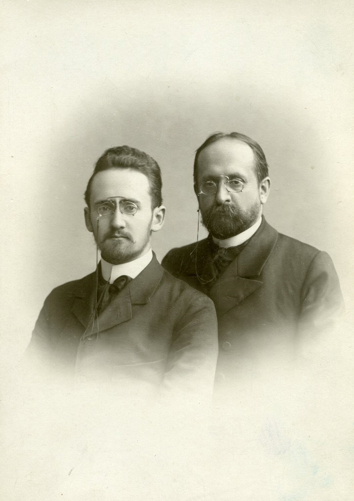 Русские учёные и общественные деятели, братья Сергей Фёдорович Ольденбург (1863-1934) и Фёдор Фёдорович Ольденбург (1861-1914)